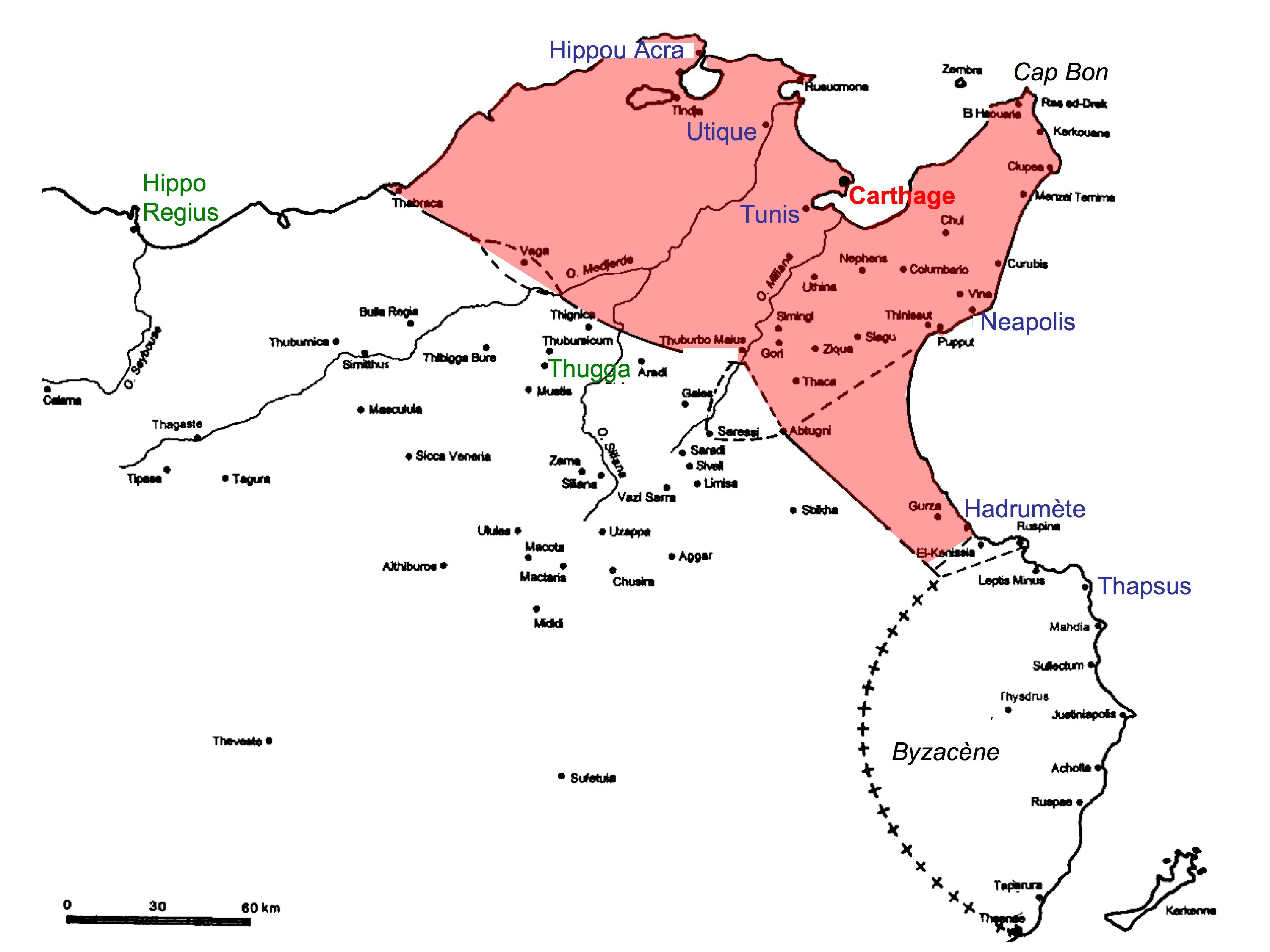 carte des territoires de Carthage en Afrique montrant les villes prises par Agathocle et celles probablement traversées par Eumachos